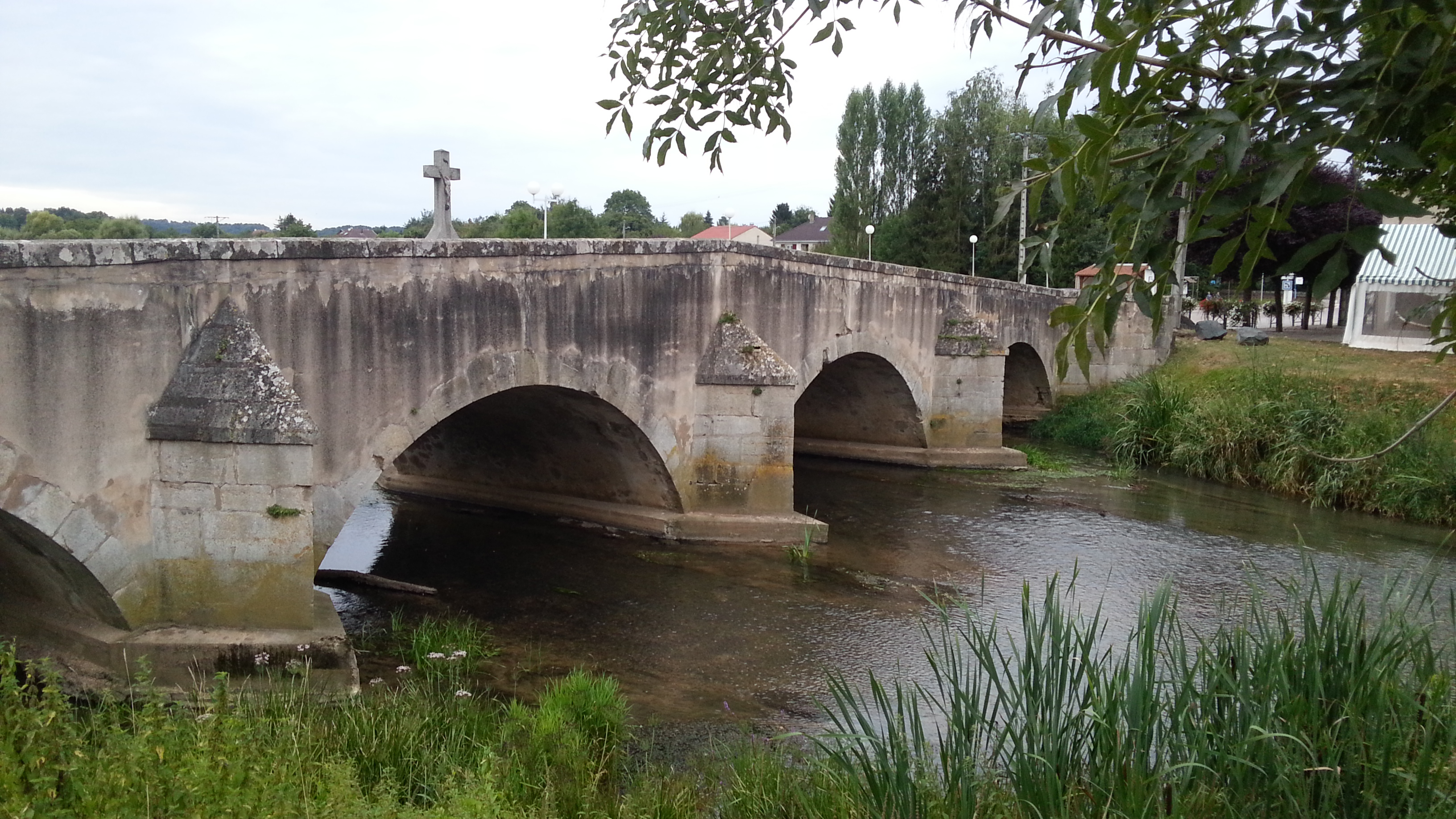 Pont voûté sur le Sânon à Crévic dans le département de Meurthe-et-Moselle en France This photo was uploaded with Wiki Loves Monuments mobile 1.2 (Android).